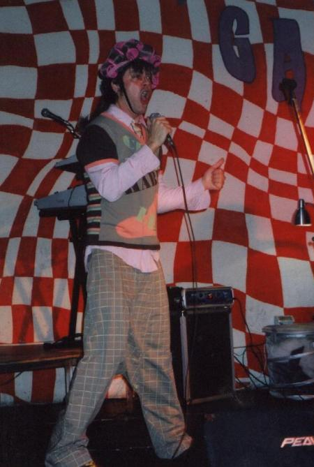 Olav Fernández, vocalista de Lkan durante el concierto de la sala Garaje de la Tía María en Murcia, dentro de la gira "Discazo"